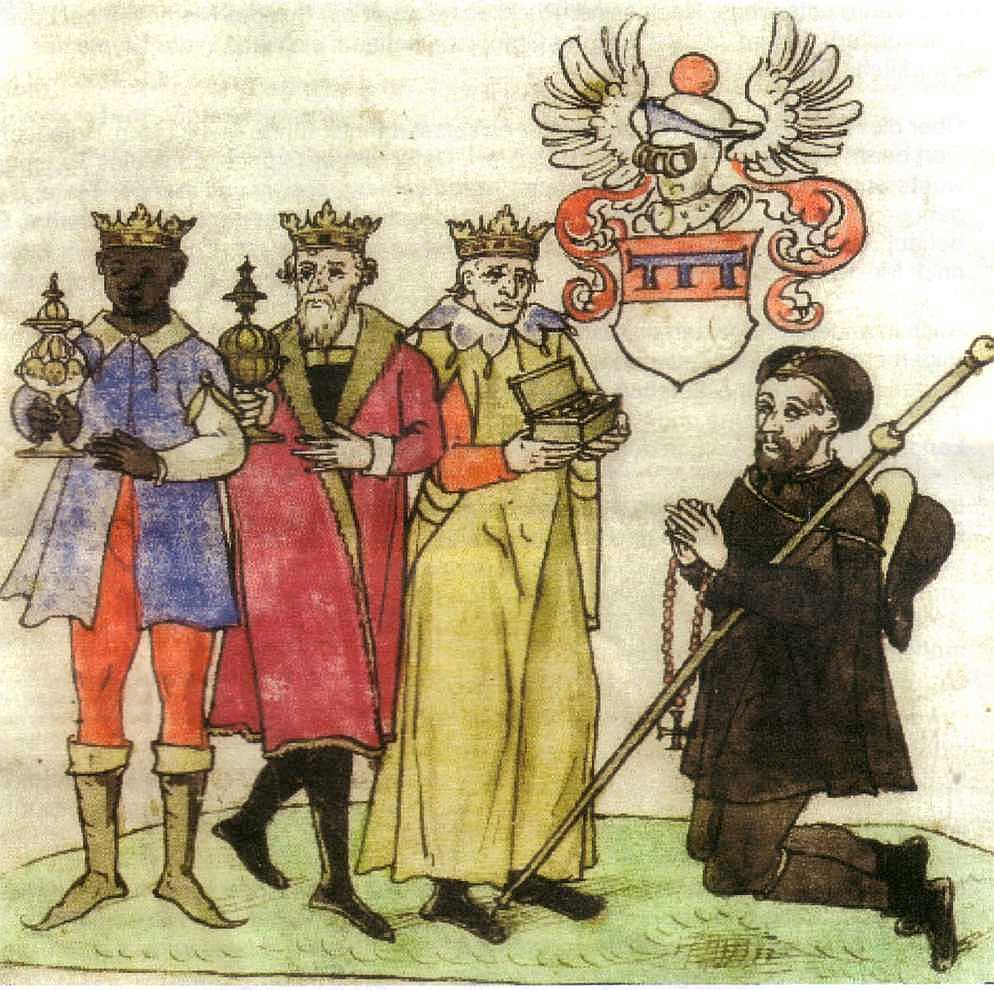 Illustration zum Pilgerbuch von Arnold von Harff, Handschrift 268 der Benediktinerabtei Maria Laach